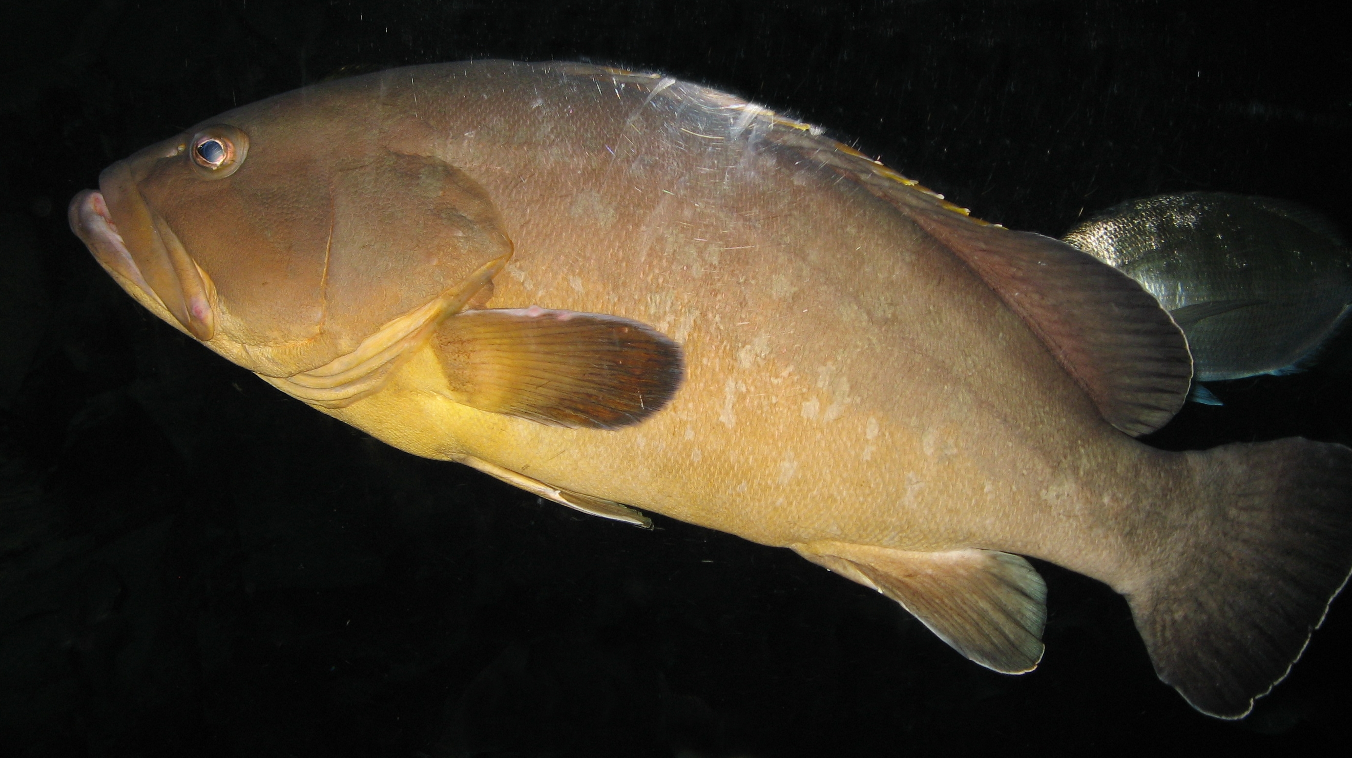 Epinephelus marginatus in Aquarium Cinéaqua Map: 48° 51' 44" N 2° 17' 27" E